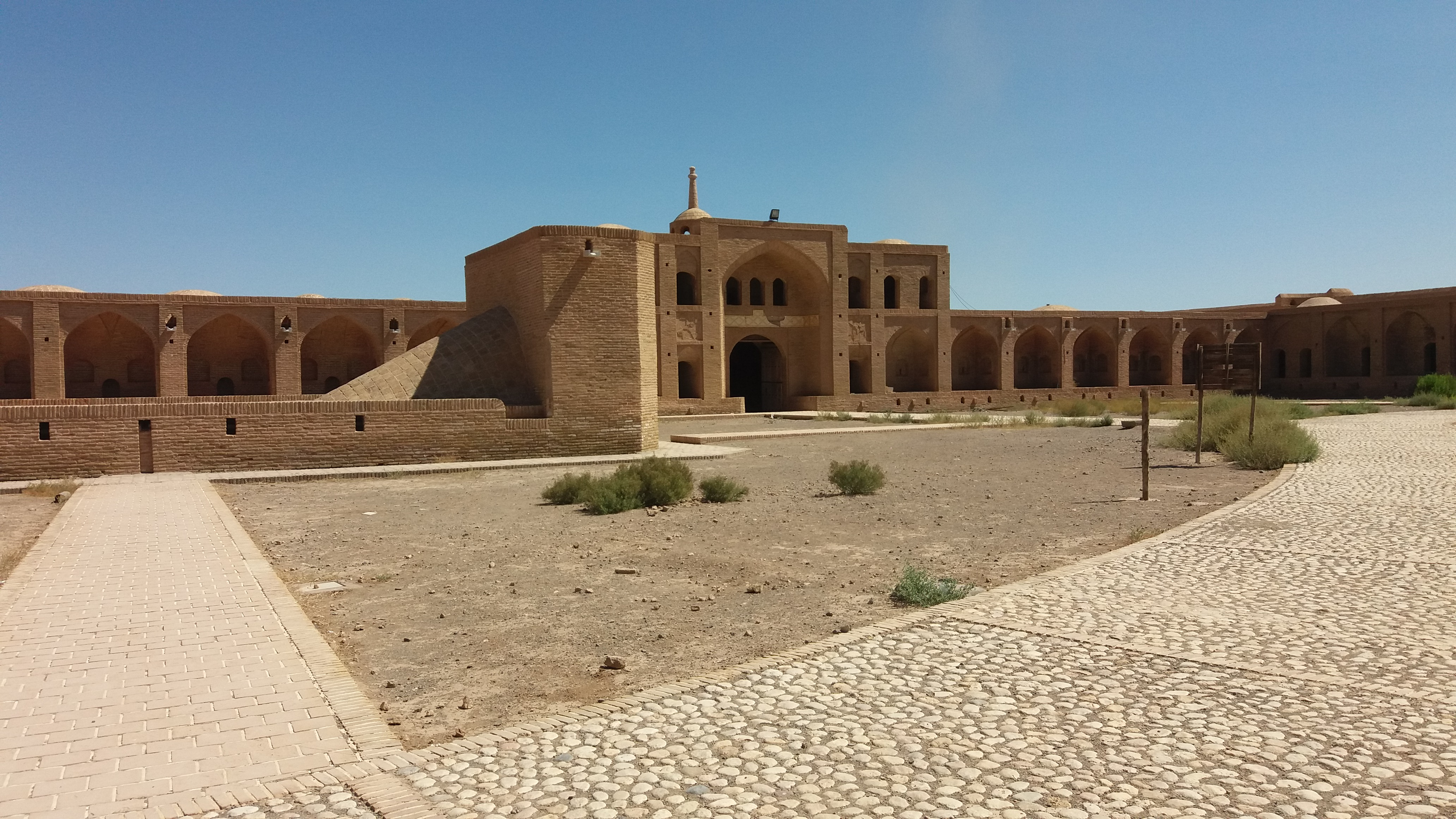 کاروانسراهای میاندشت